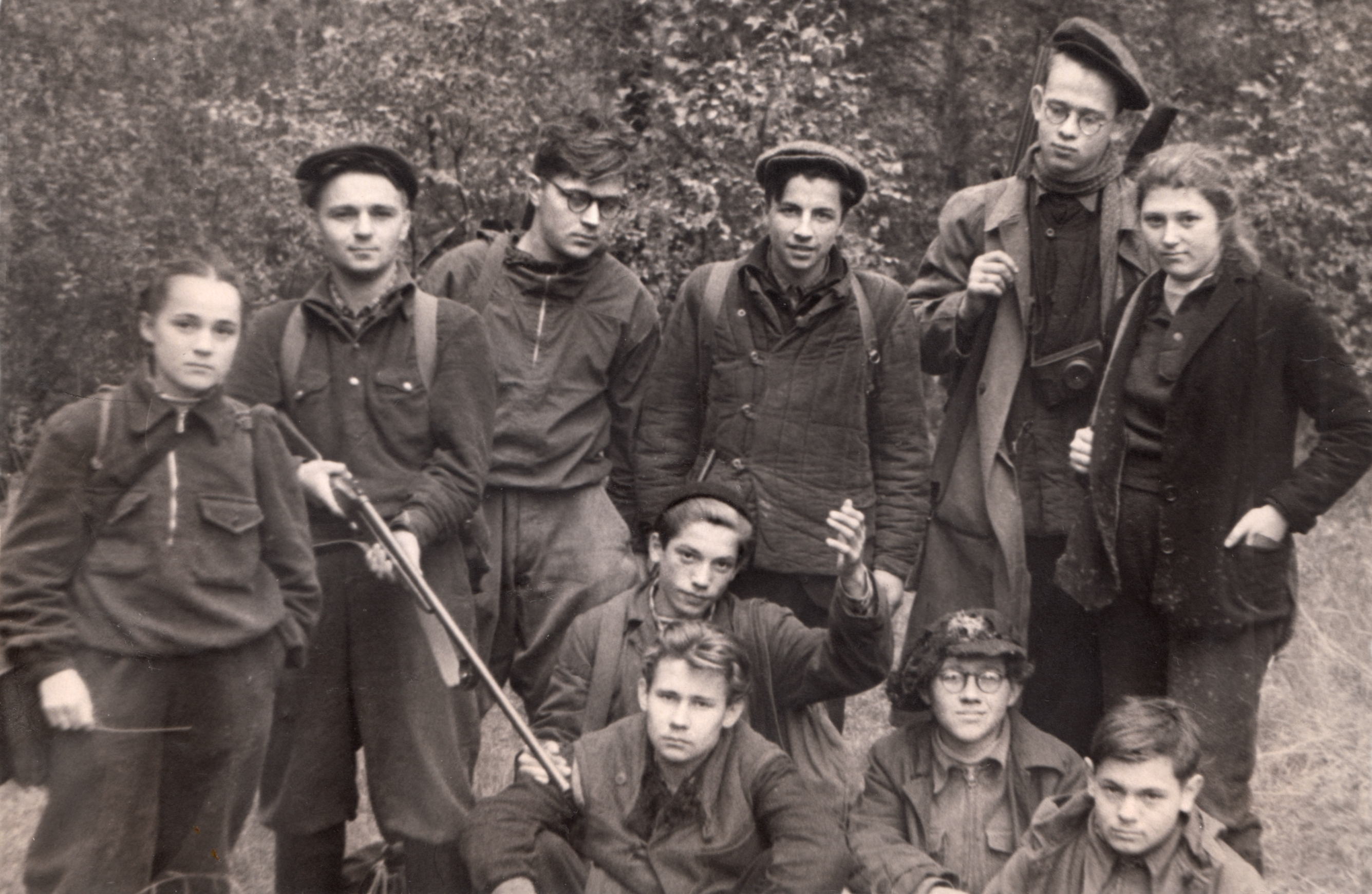 Выезд Кружка ВООП в Берёзки, осенью 1955 г. на фото: Сидят: Игорь Кузьмин (Кузя), Роман Злотин (Ромчик), Юра Раджабов (Раджаб), в кепке (которую измолотили выстрелами, ко всеобщему восторгу), Миша Черняховский (Кавалер); Стоят: Таня Егорова, Володя Князев (Князь, "Человек с ружьём"), Леня Лисовенко (Лисовенок), Юра Очков (Воча), Борис Доброхотов (Б.П.Д., т.е. большой пёстрый дятел, а также - Pusilla, т.е, Крошка, по латыни) и Лена Синицына (Леночка).